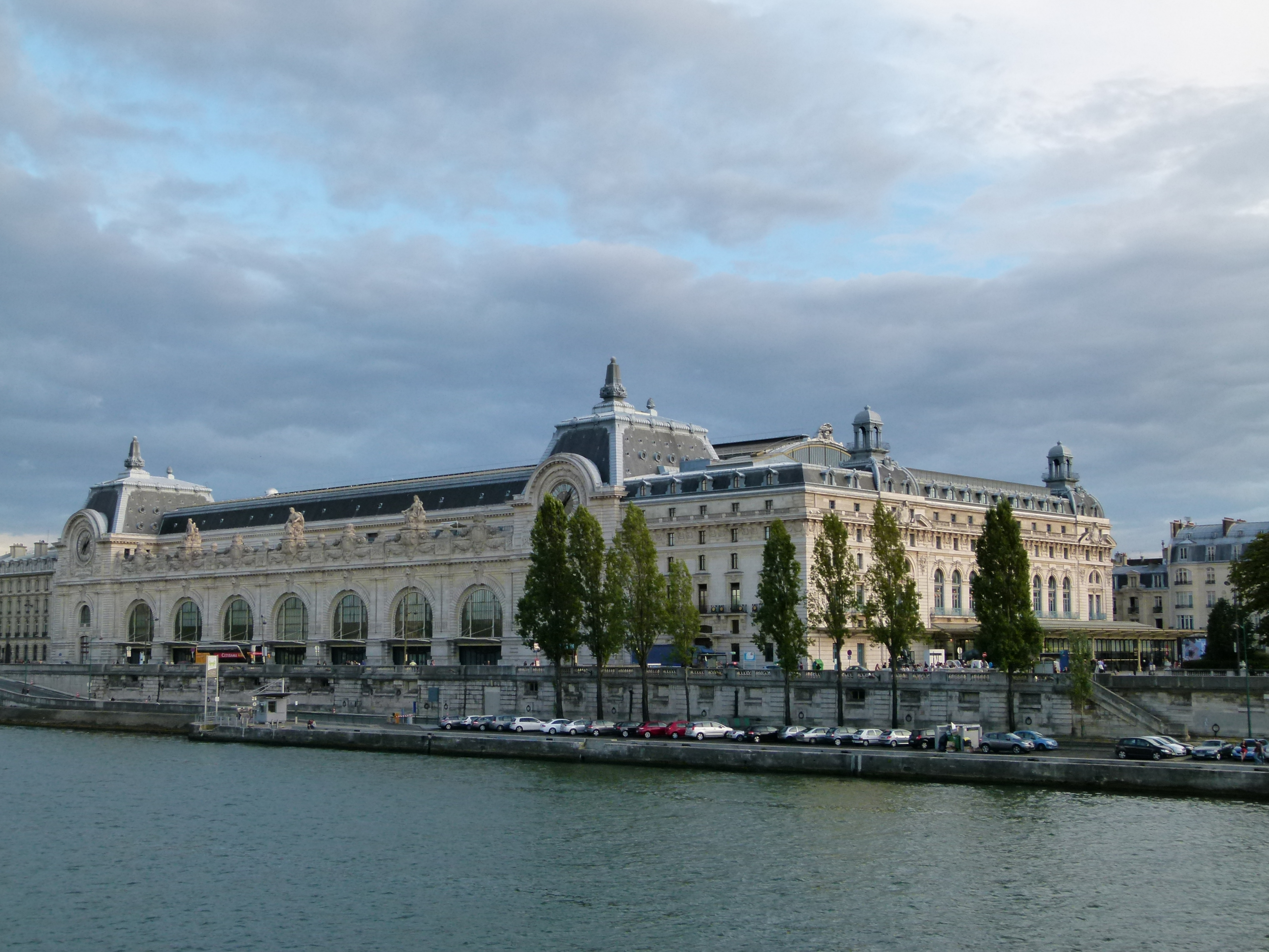 Vue d'ensemble du musée d'Orsay